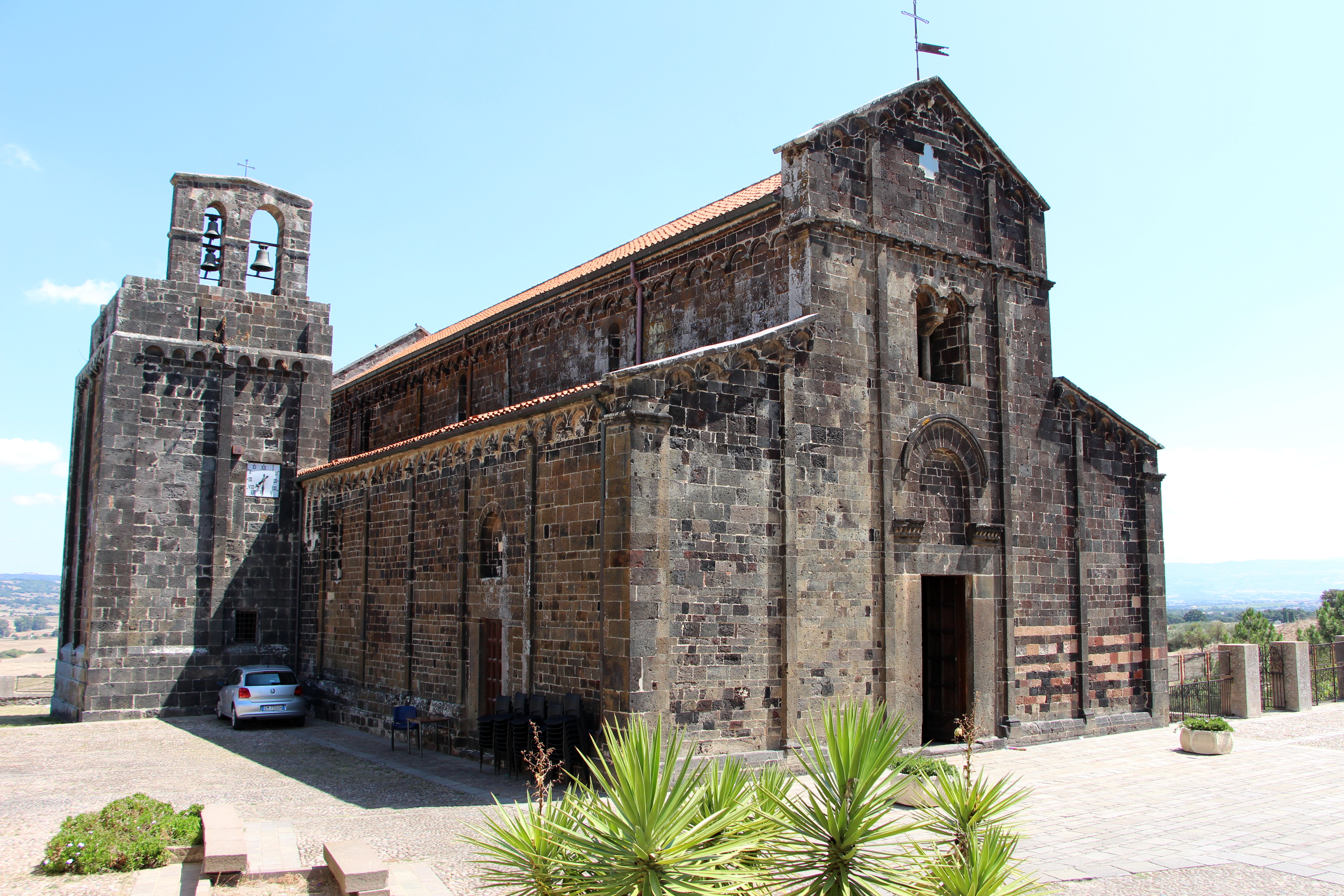 Chiesa di Santa Maria del Regno (Ardara, Sardegna)